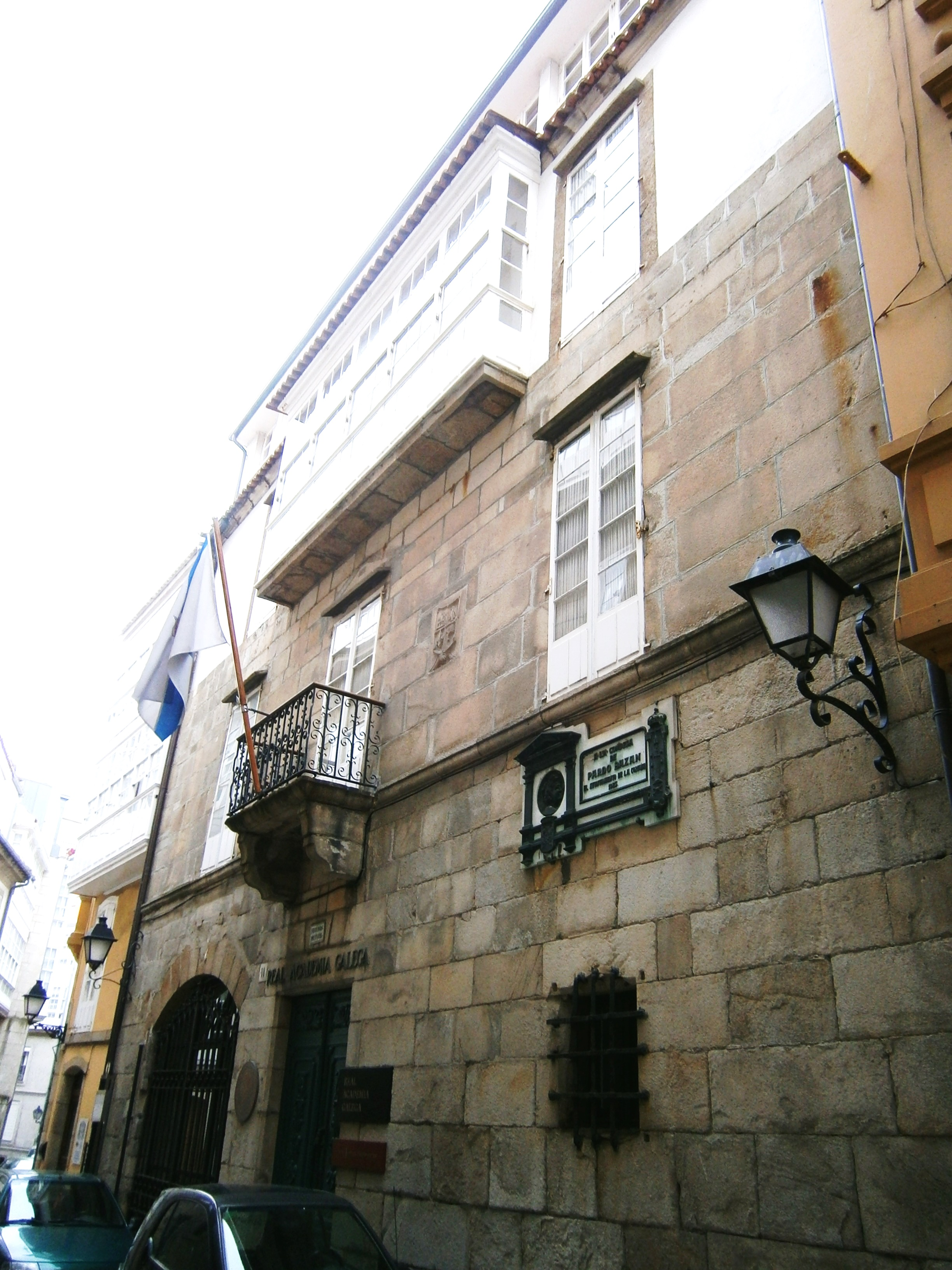 Sede da Real Academia Galega e a Casa Museo de Emilia Pardo Bazán (Cidade Vella da Coruña)